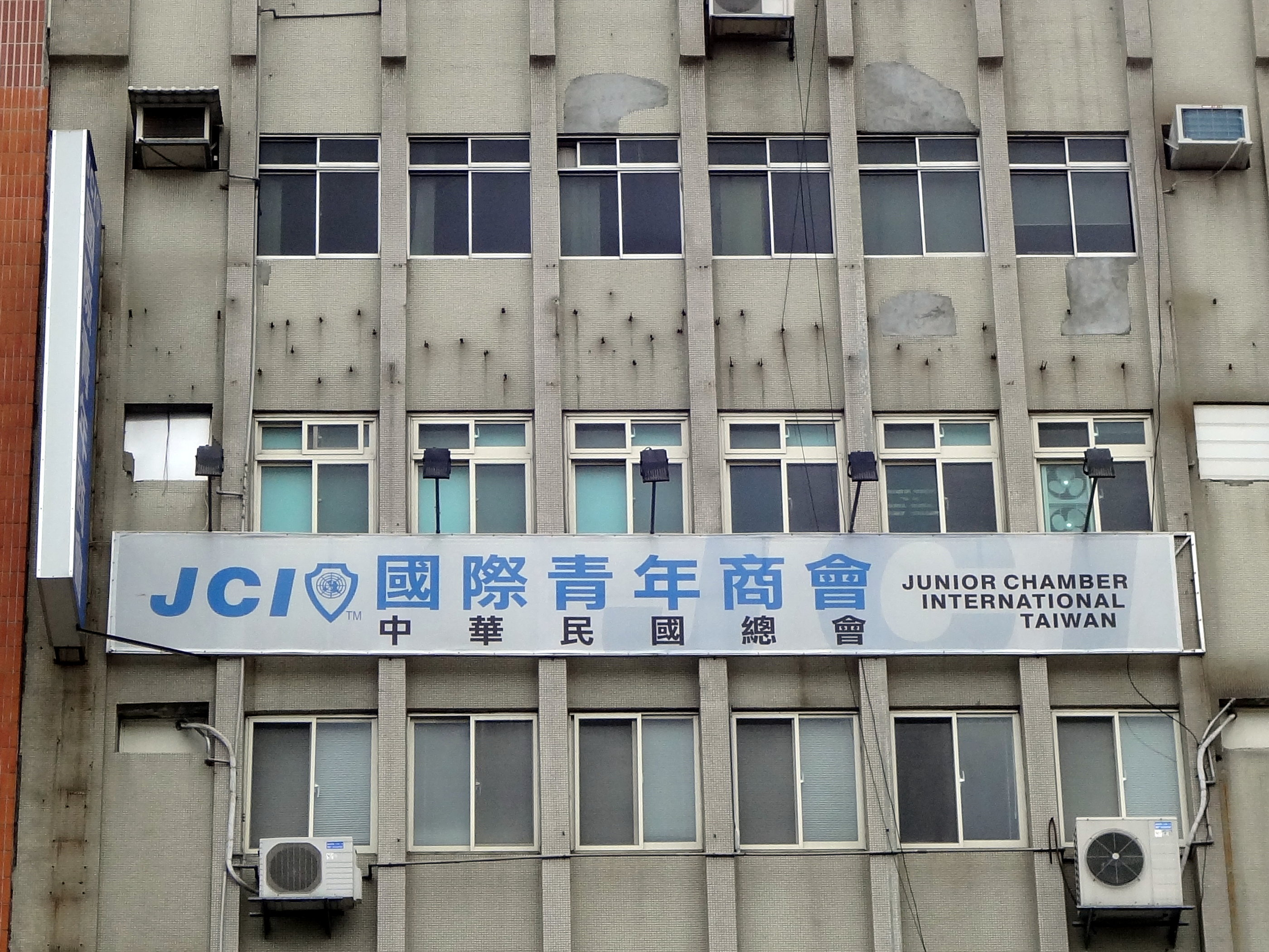 國際青年商會中華民國總會，地址：臺北市松山區南京東路四段45號8樓。